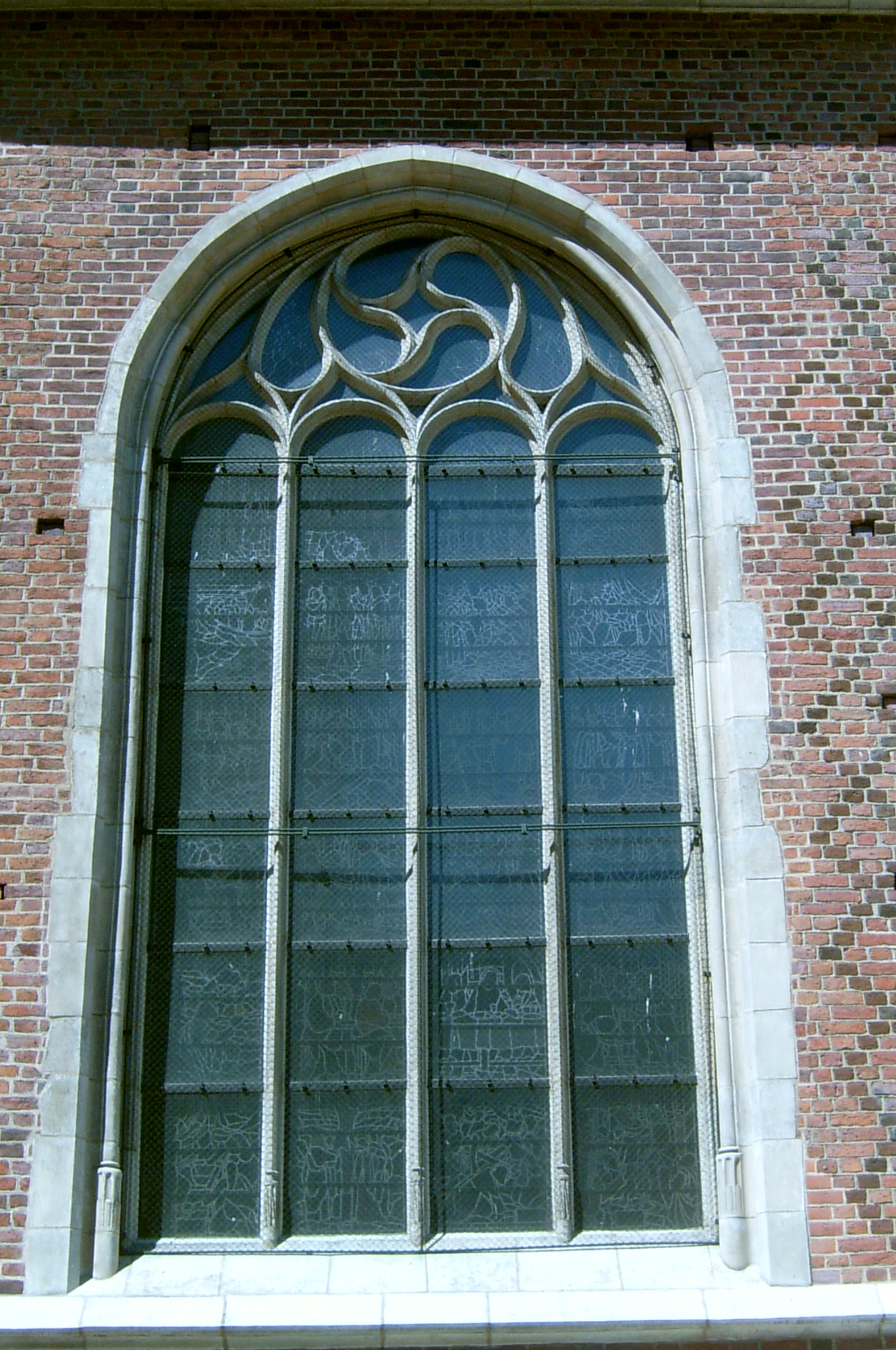 Kraków, Poland